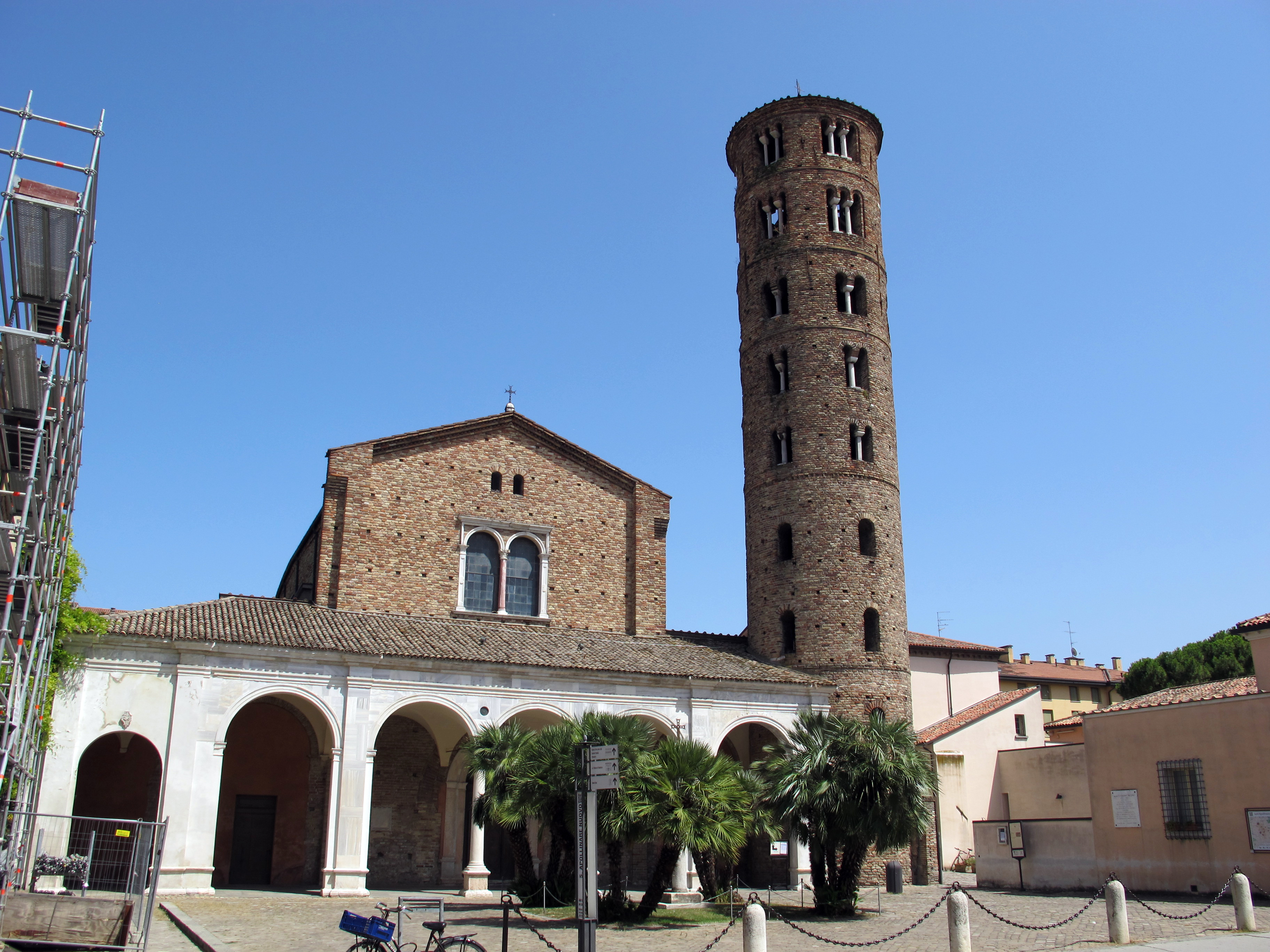 Basilica di Sant'Apollinare Nuovo - MIBAC This is a photo of a monument which is part of cultural heritage of Italy.